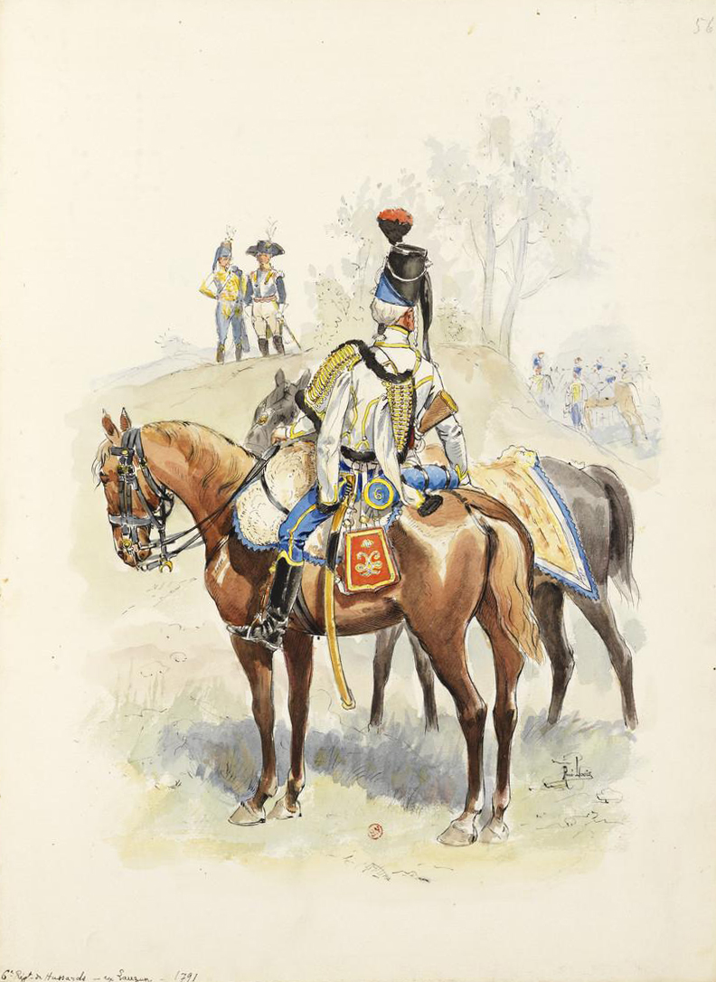 Cavalier du 6e Hussards en 1791